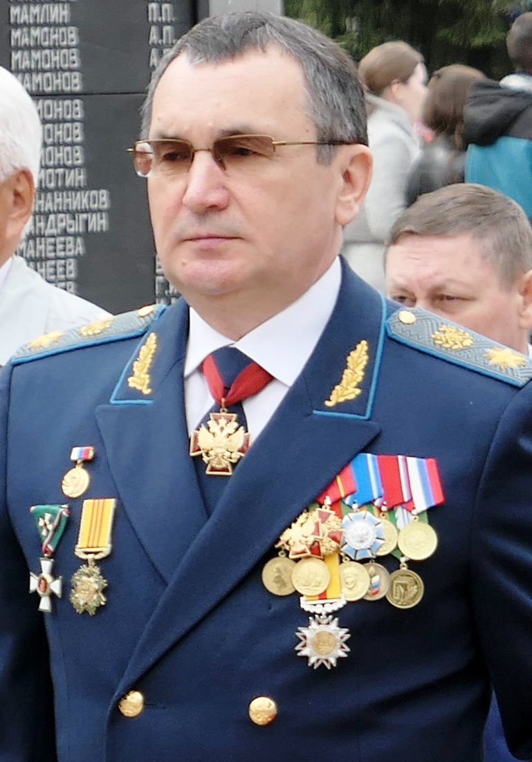 Николай Васильевич Фёдоров (род. 1958) — российский государственный деятель